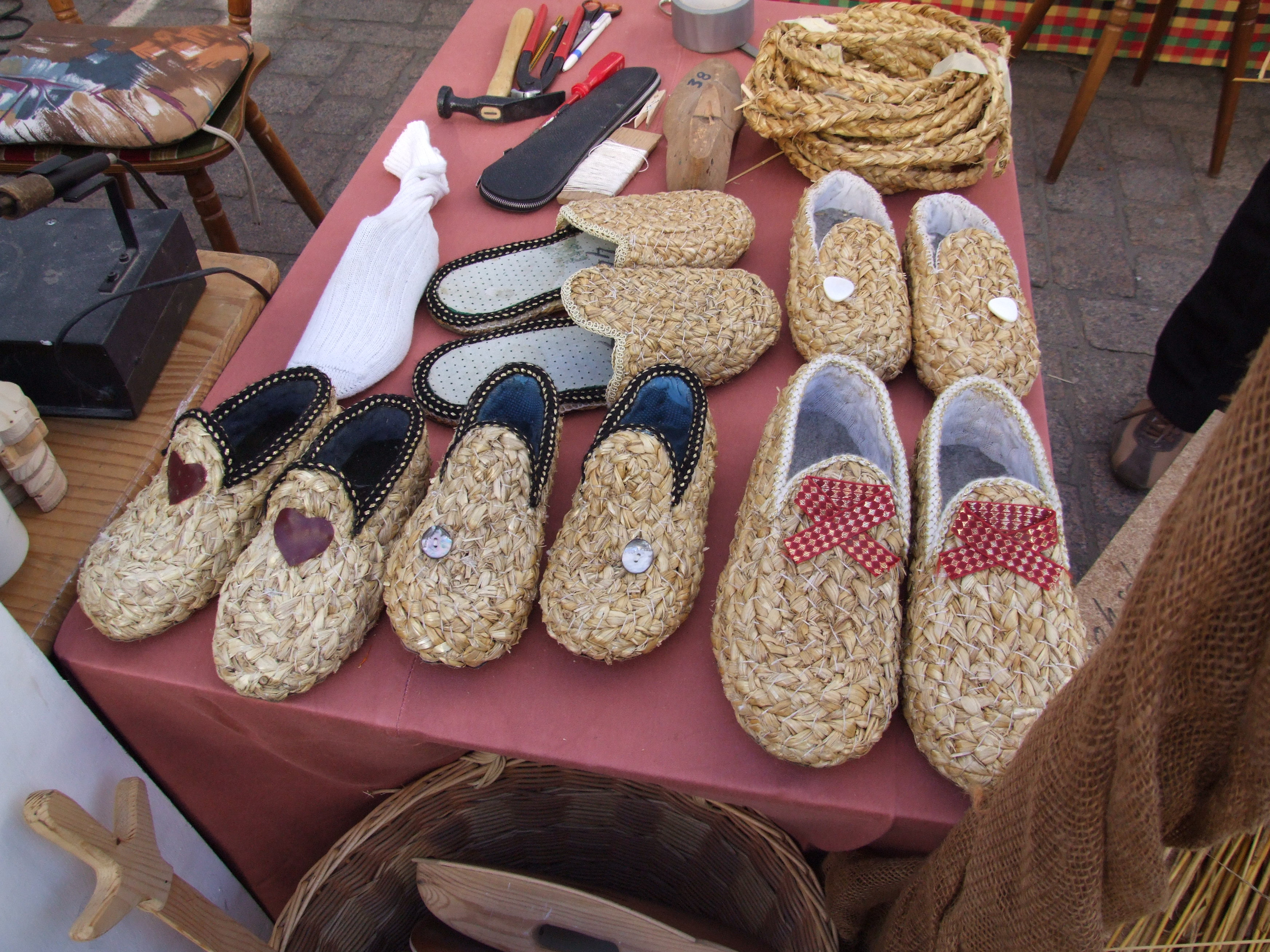 Strohschuhe aus dem Hunsrück, hergestellt von einer Gruppe alter Handwerkerinnen und Handwerker (alle über 70 Jahre), die hergestellt und verkauft wurden, um Geld für krebskranke Kinder zu sammeln; fotographiert auf dem Bauernmarkt 2007 in Speyer, dem letzten Auftritt der Handwerkergruppe